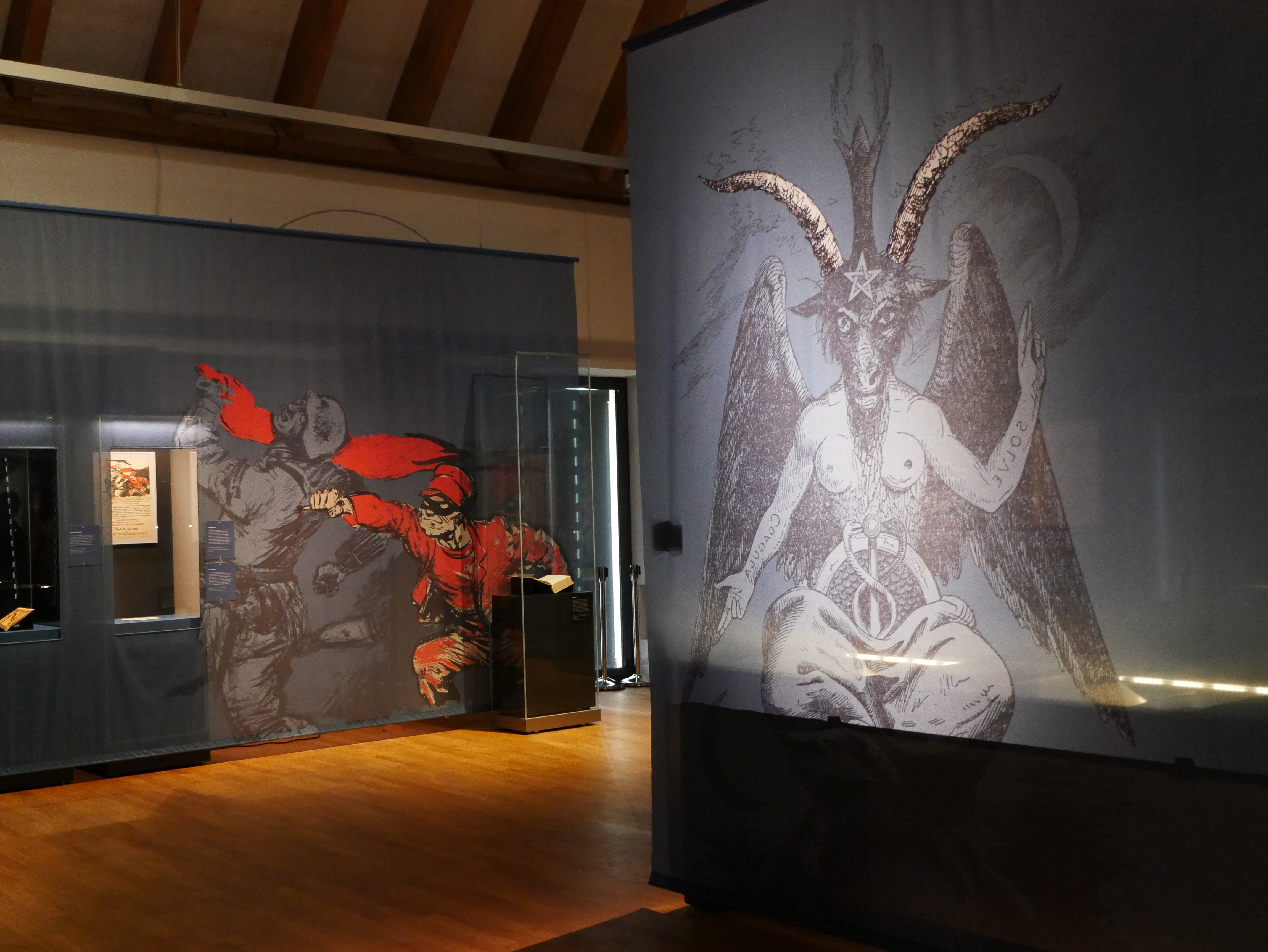 Ausstellungsraum der Stiftung Kloster Dalheim. LWL-Landesmuseum für Klosterkultur, Sonderausstellung: "Verschwörungstheorien - früher und heute", Abbildungen: Dolchstoßlegende, Baphomet, Foto: LWL/Alexandra Buterus